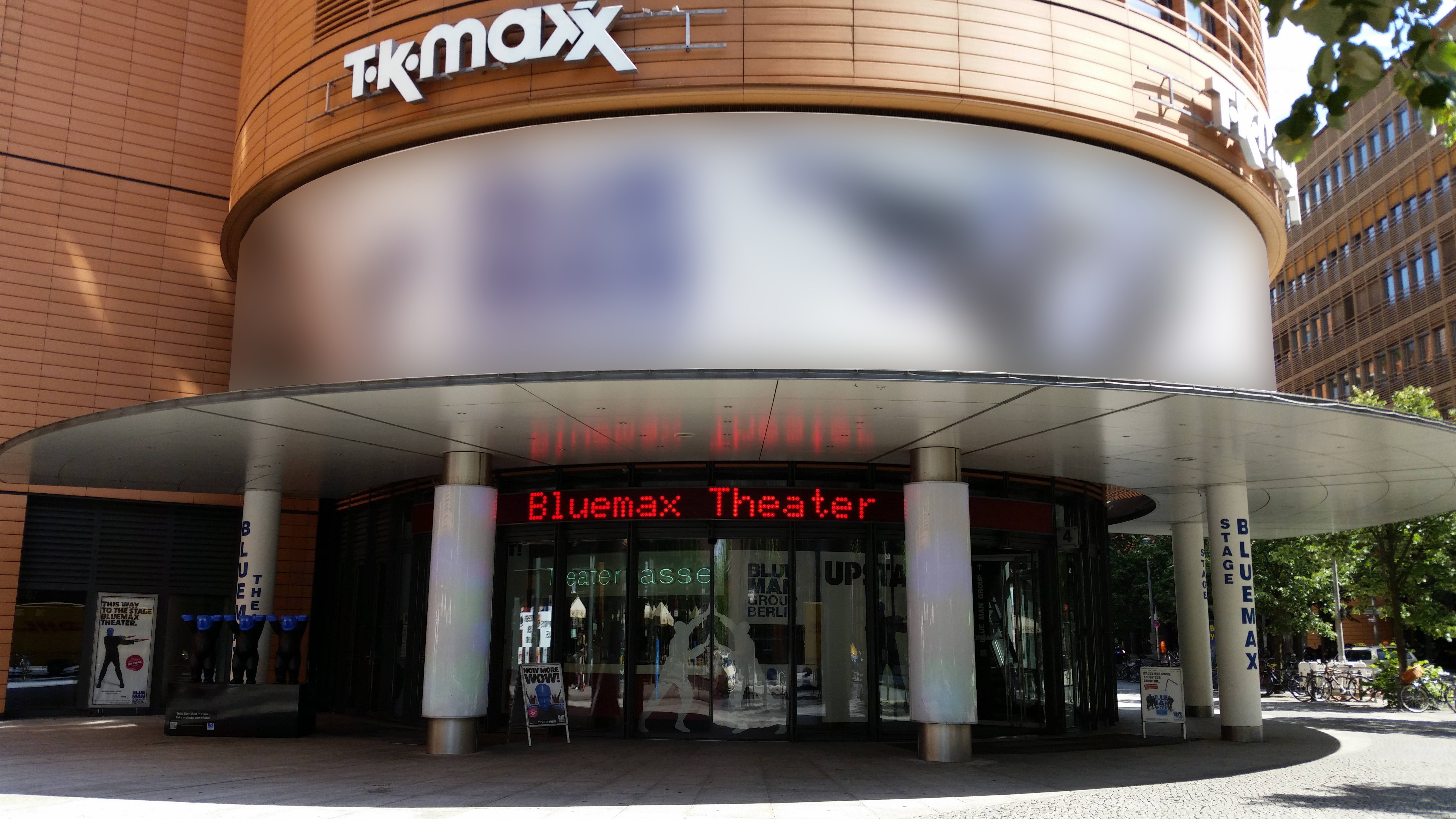 Stage BlueMax Theater Berlin vom Marlene-Dietrich-Platz aus gesehen